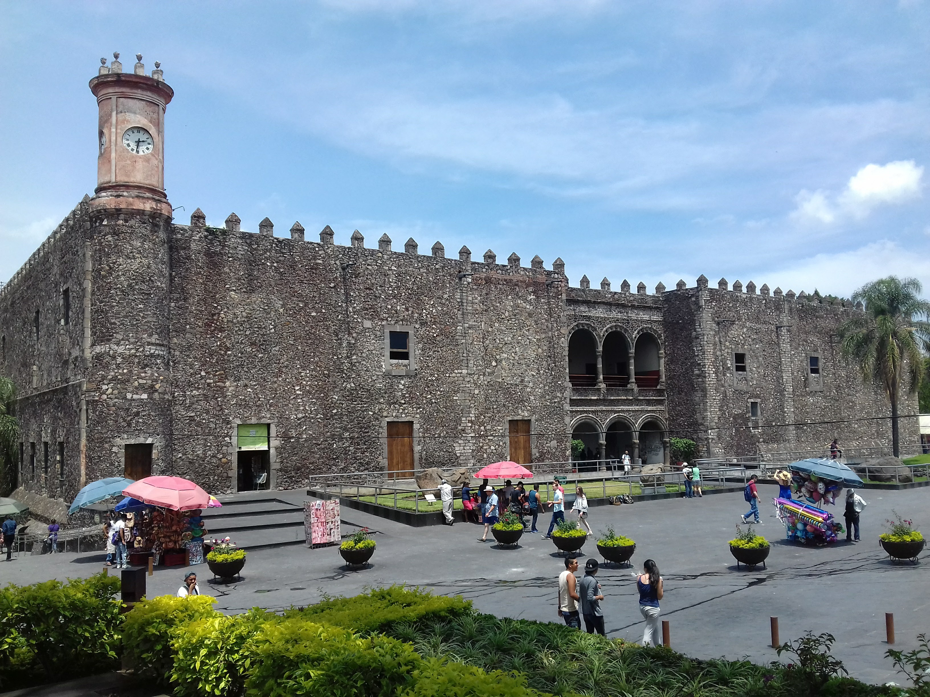 palacio de Cortés ante del sismo